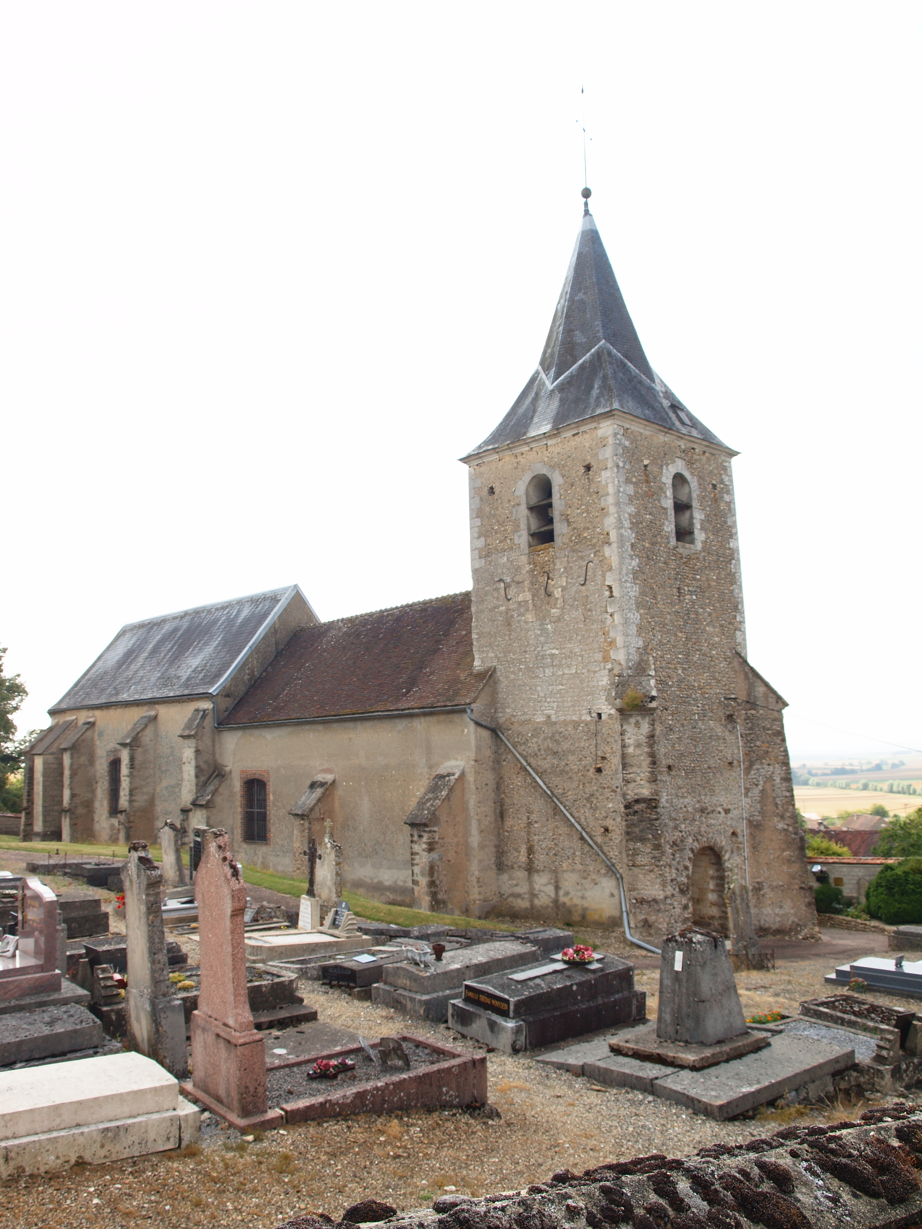 Bellechaume (Yonne, France)